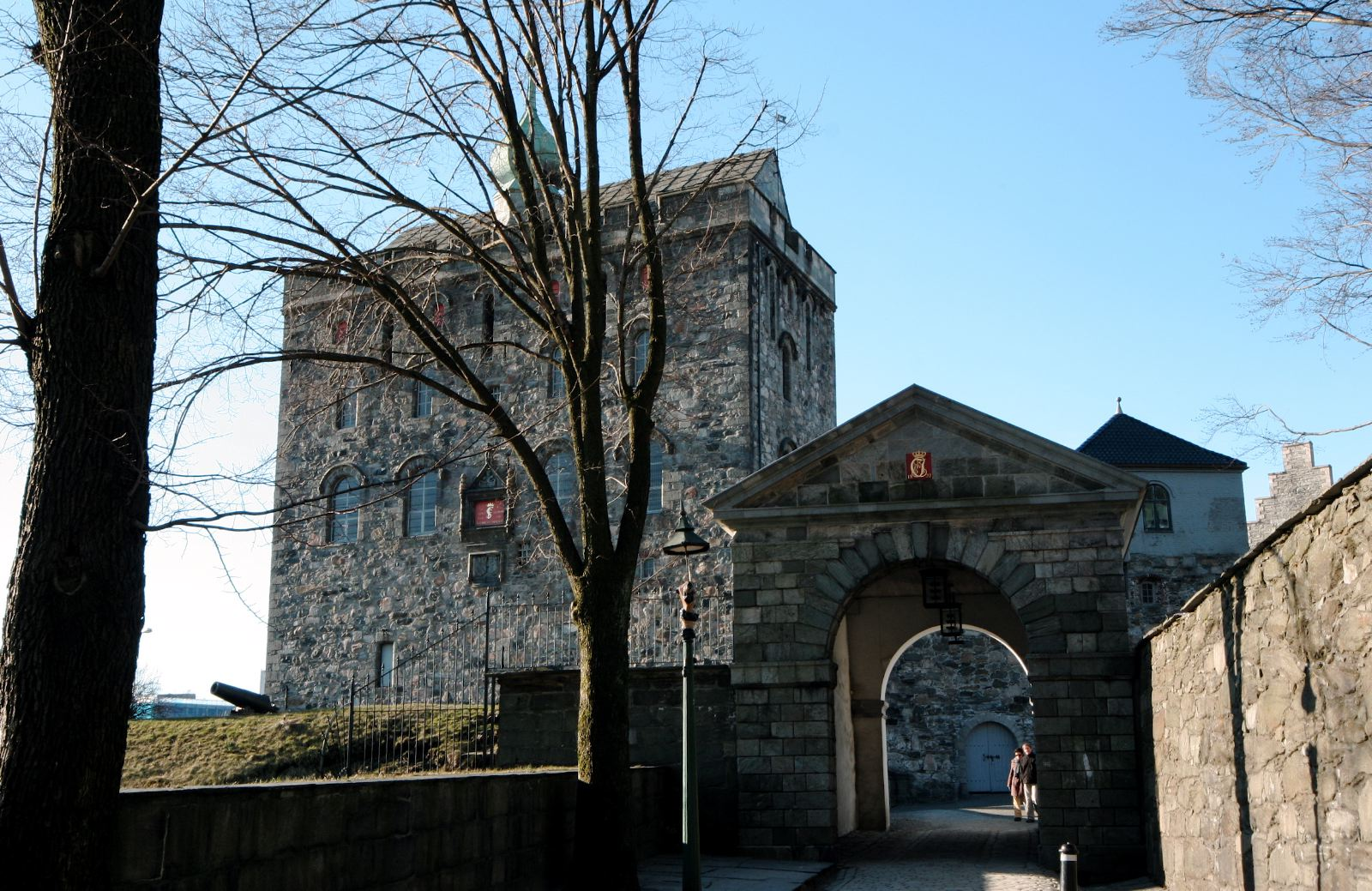 Rosenkrantztårnet i Bergen